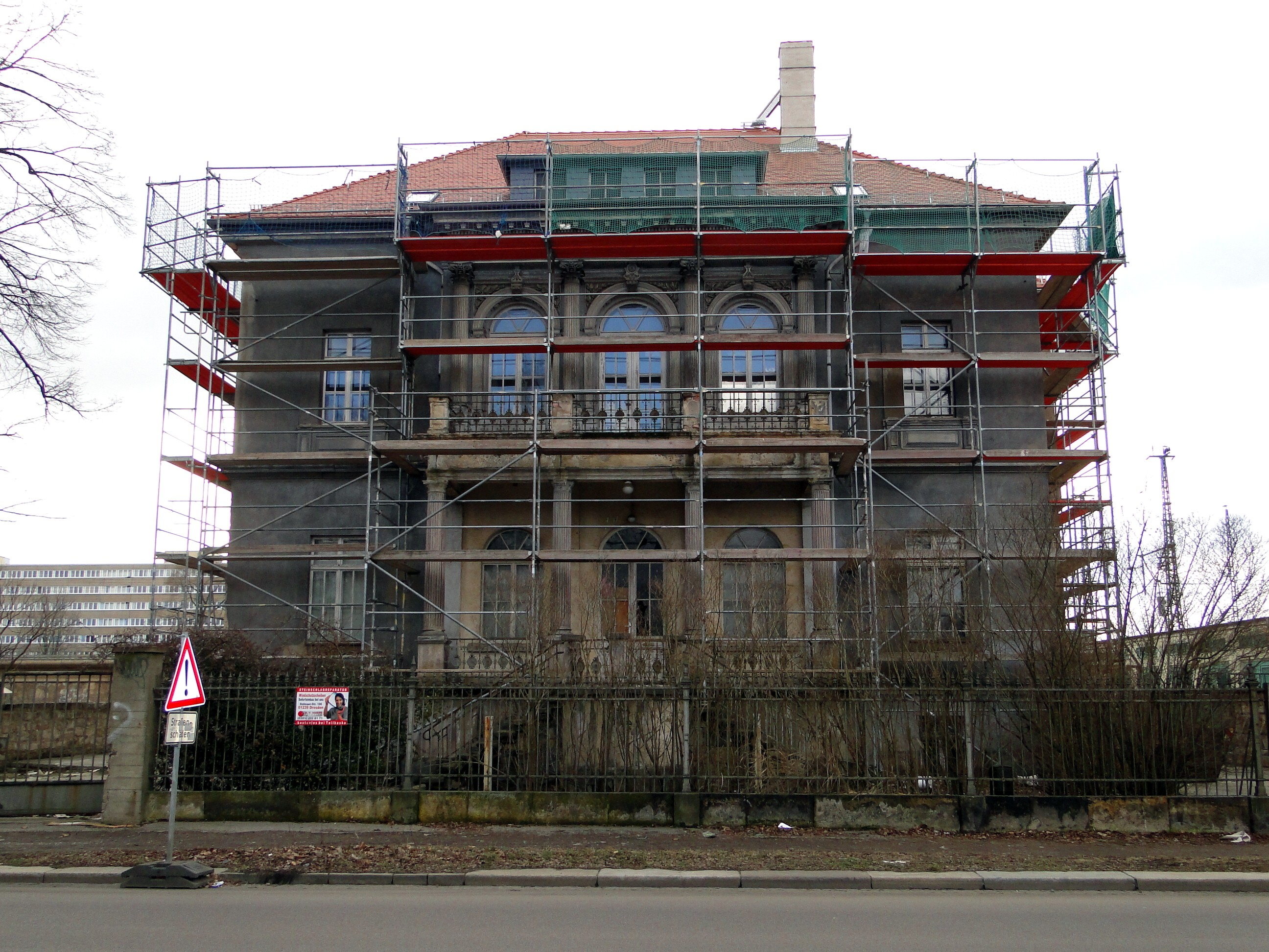 Villa Wiener Straße 36 in Dresden